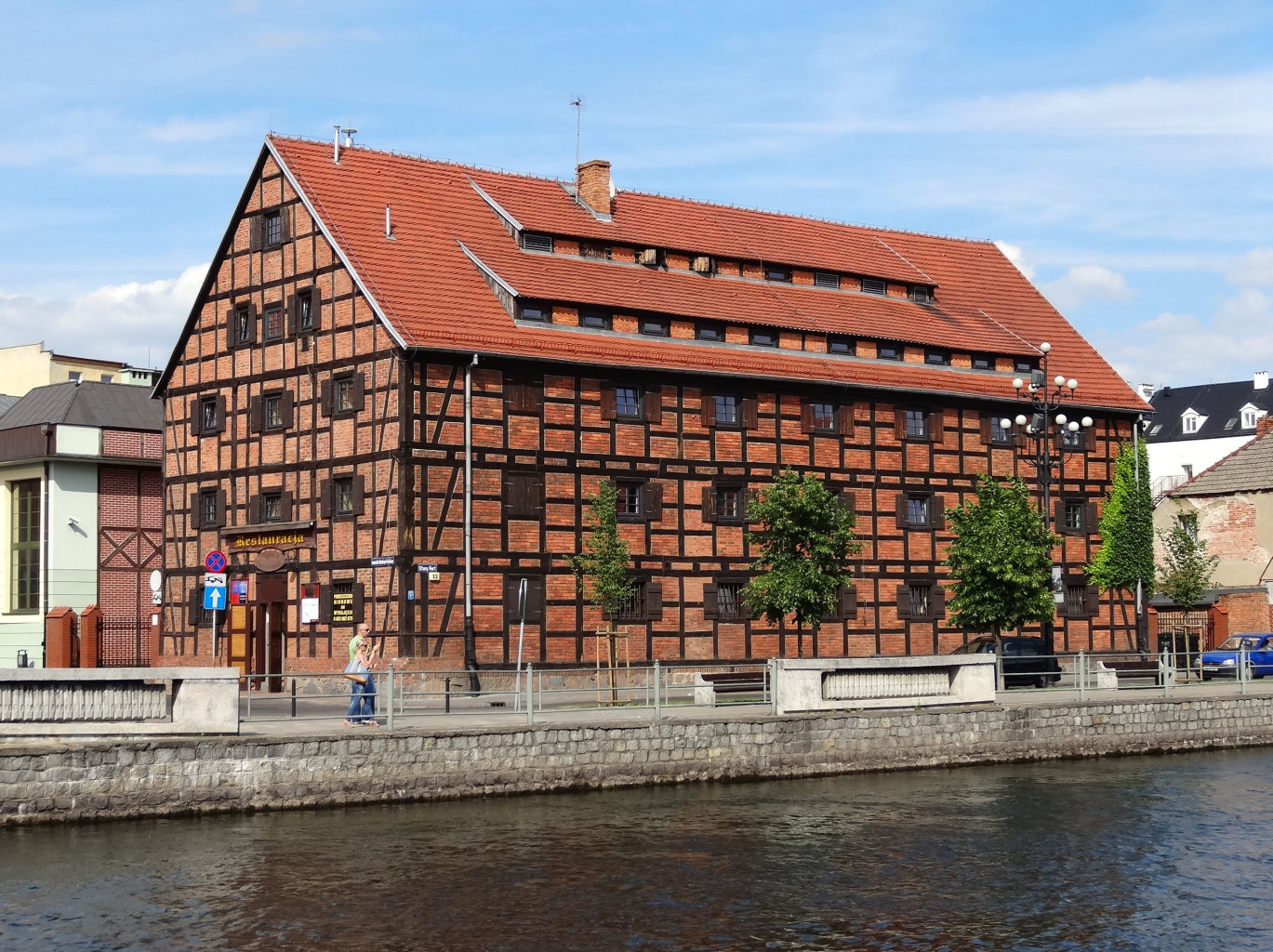 Spichlerz nad Brdą w Bydgoszczy przy ul. Stary Port zbud. w latach 30. XIX wieku